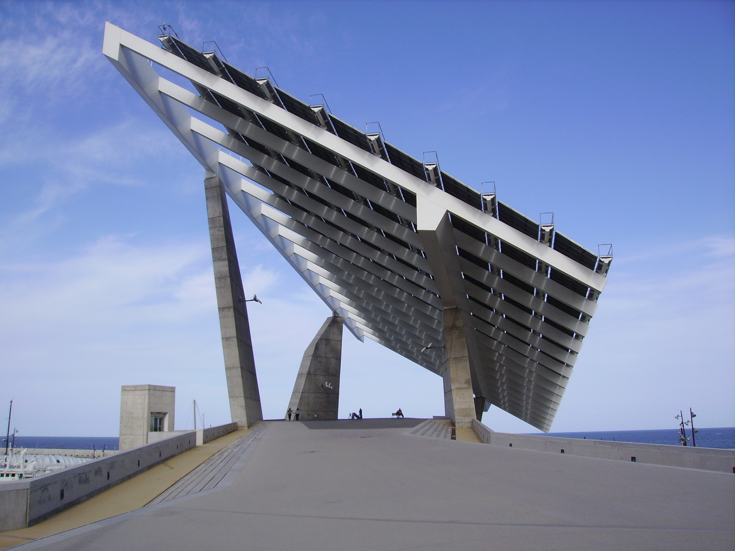 Placa Fotovoltàica al Fòrum,Barcelona,Catalunya